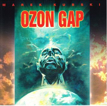 Okładka albumu muzycznego "Ozon Gap" (1998) wydanego przez Marka Kubskiego